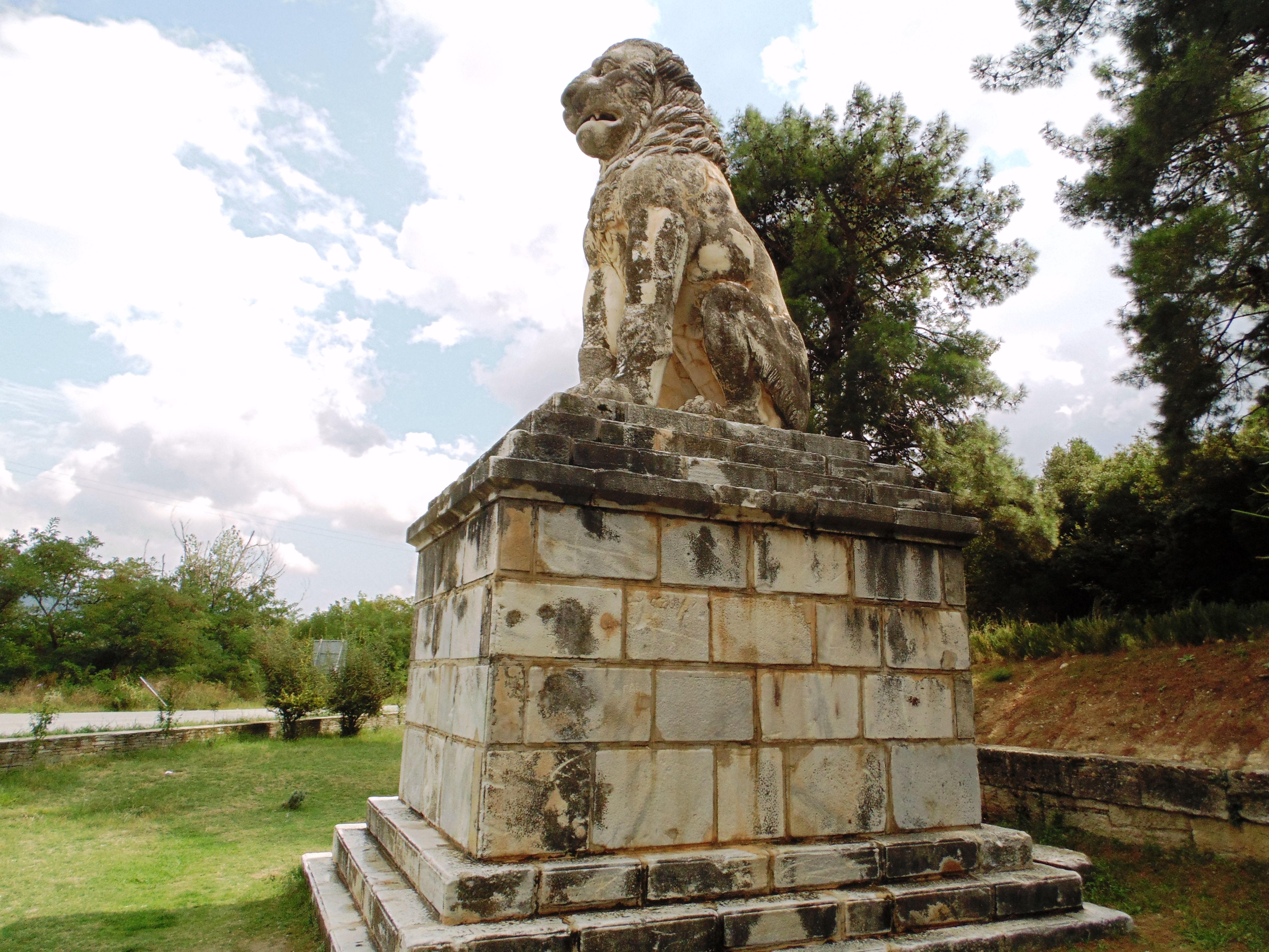 Amfipoli, Greece